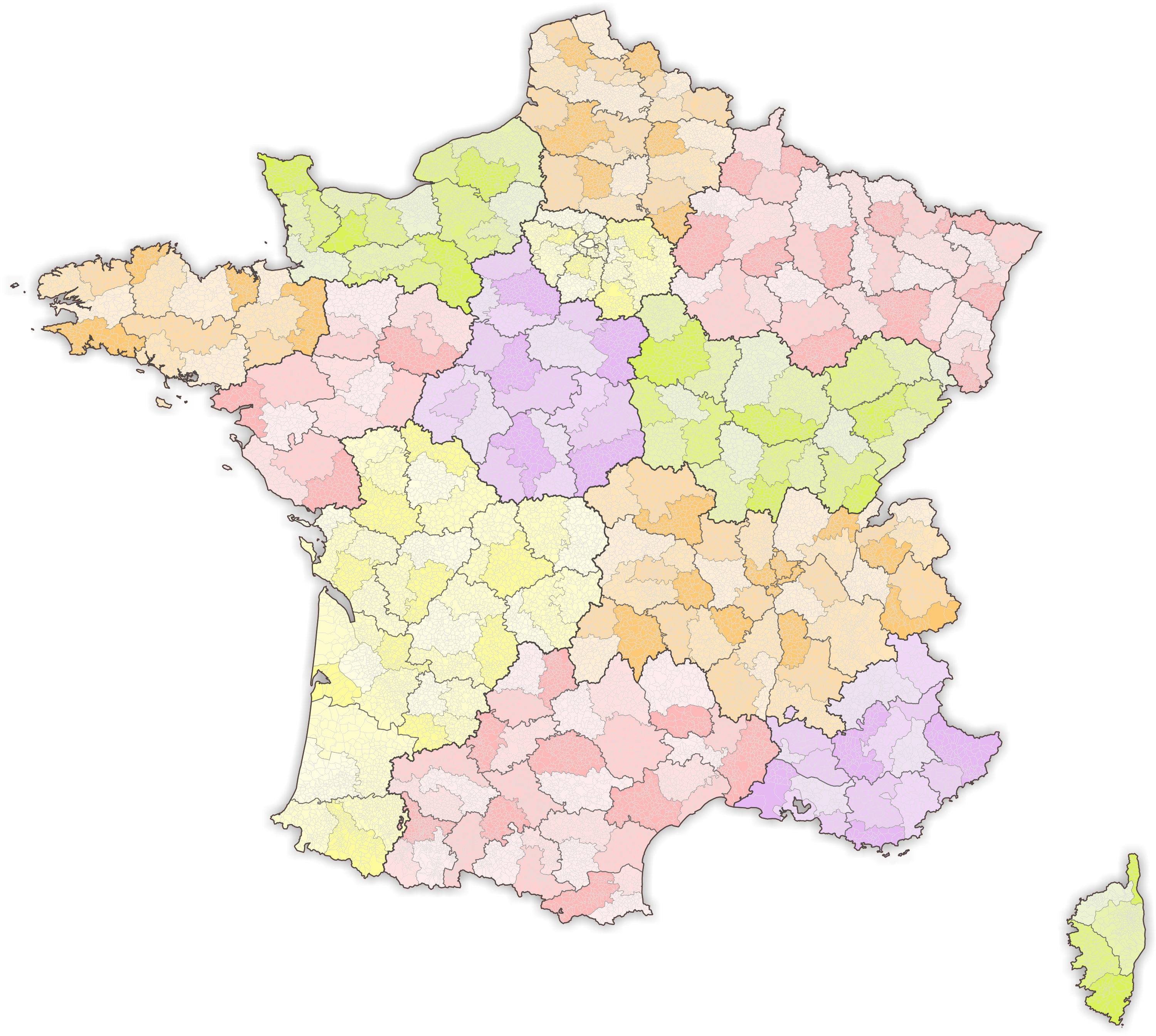 Arrondissements Frankreich Stand 2019